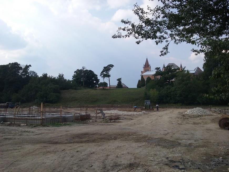 Parc sat Sântămăria-Orlea; comuna Sântămăria-Orlea sec. XIX 03